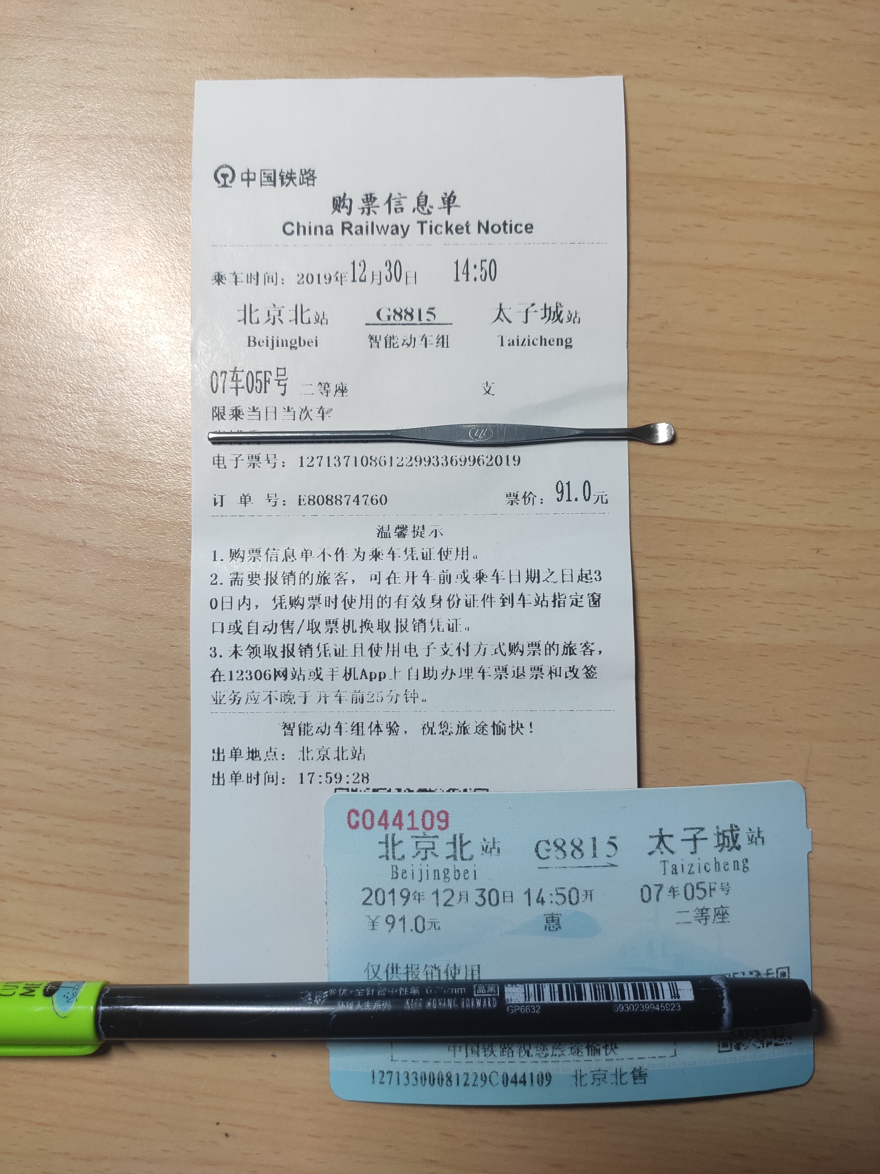 中文（中国大陆）: 背景为购票信息单；前景为报销凭证；二者均不能作为乘车凭证，只有可以机读的身份证、双程证和护照可以作为乘车凭证；G8815是京张高铁智能动车组列车车次。